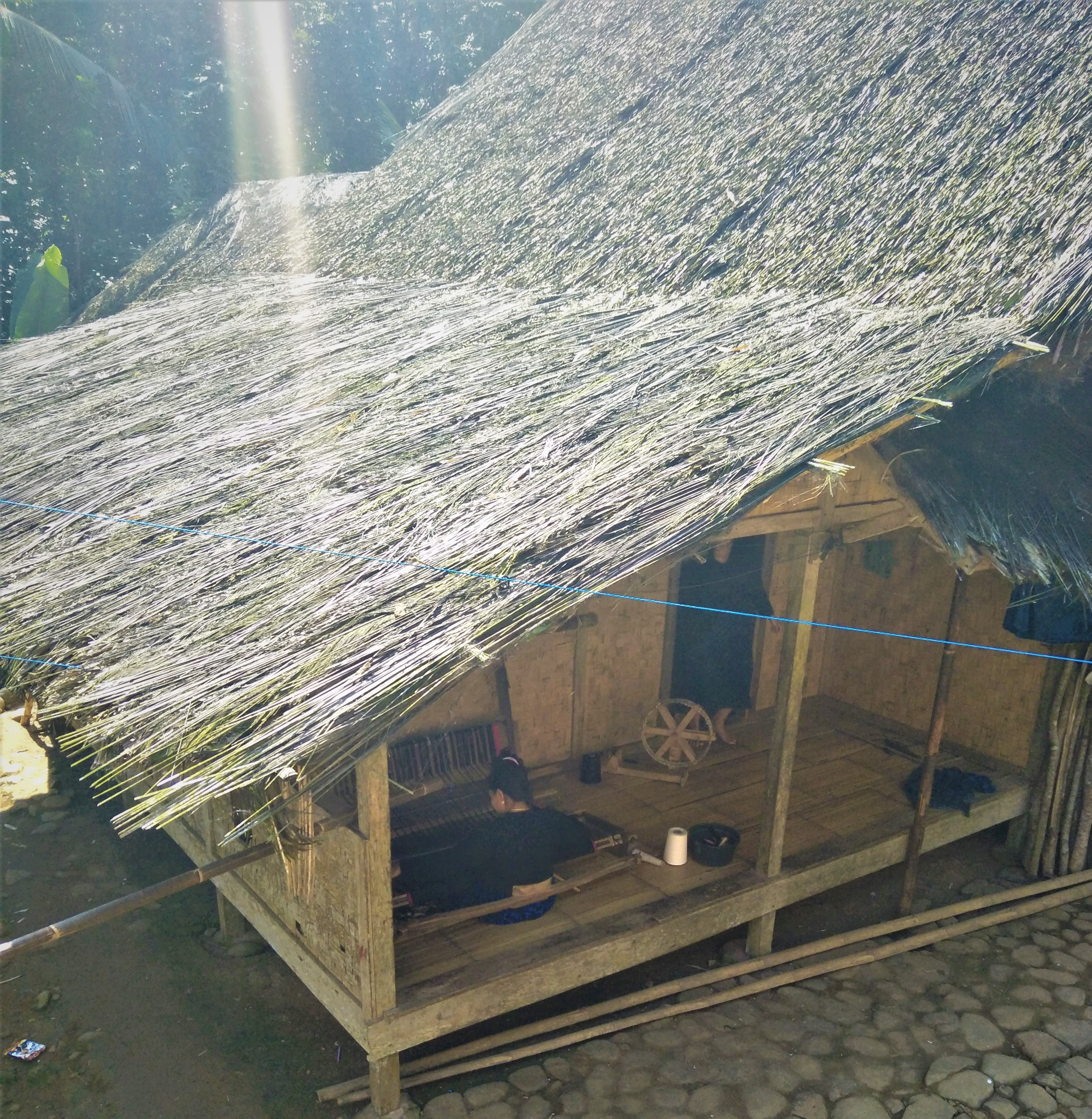 Gadis suku Baduy luar sedang menenun kain khas suku Baduy